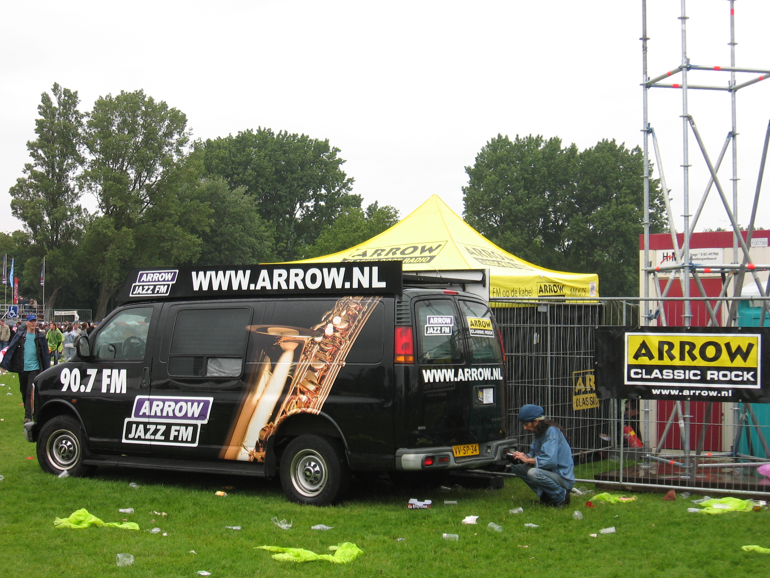 Arrow FM parkpop, Den Haag